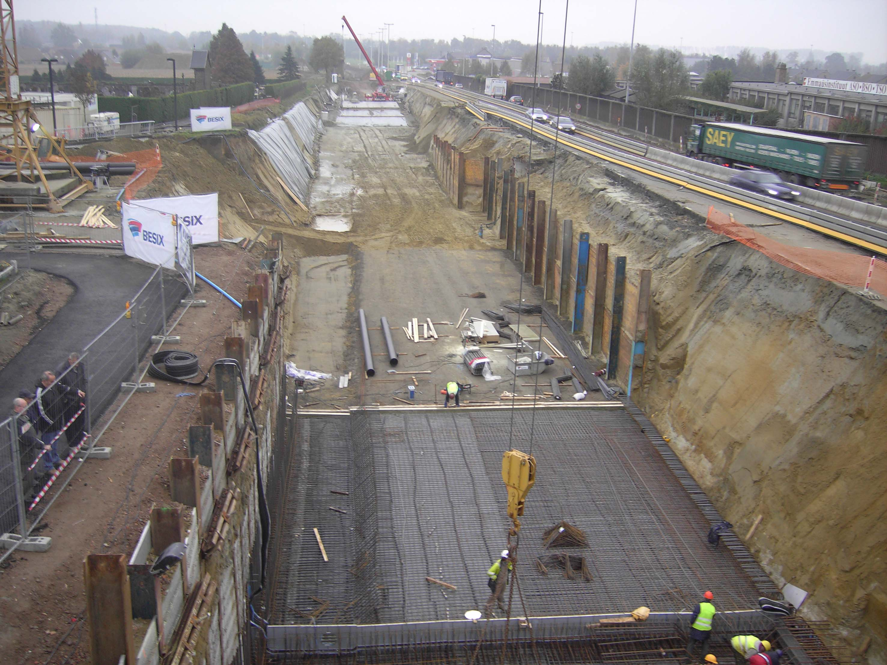 Aalter - grote infrastructuurwerken - aanleggen tunnel langs de N44 ter hoogte van de Brouwerijstraat.